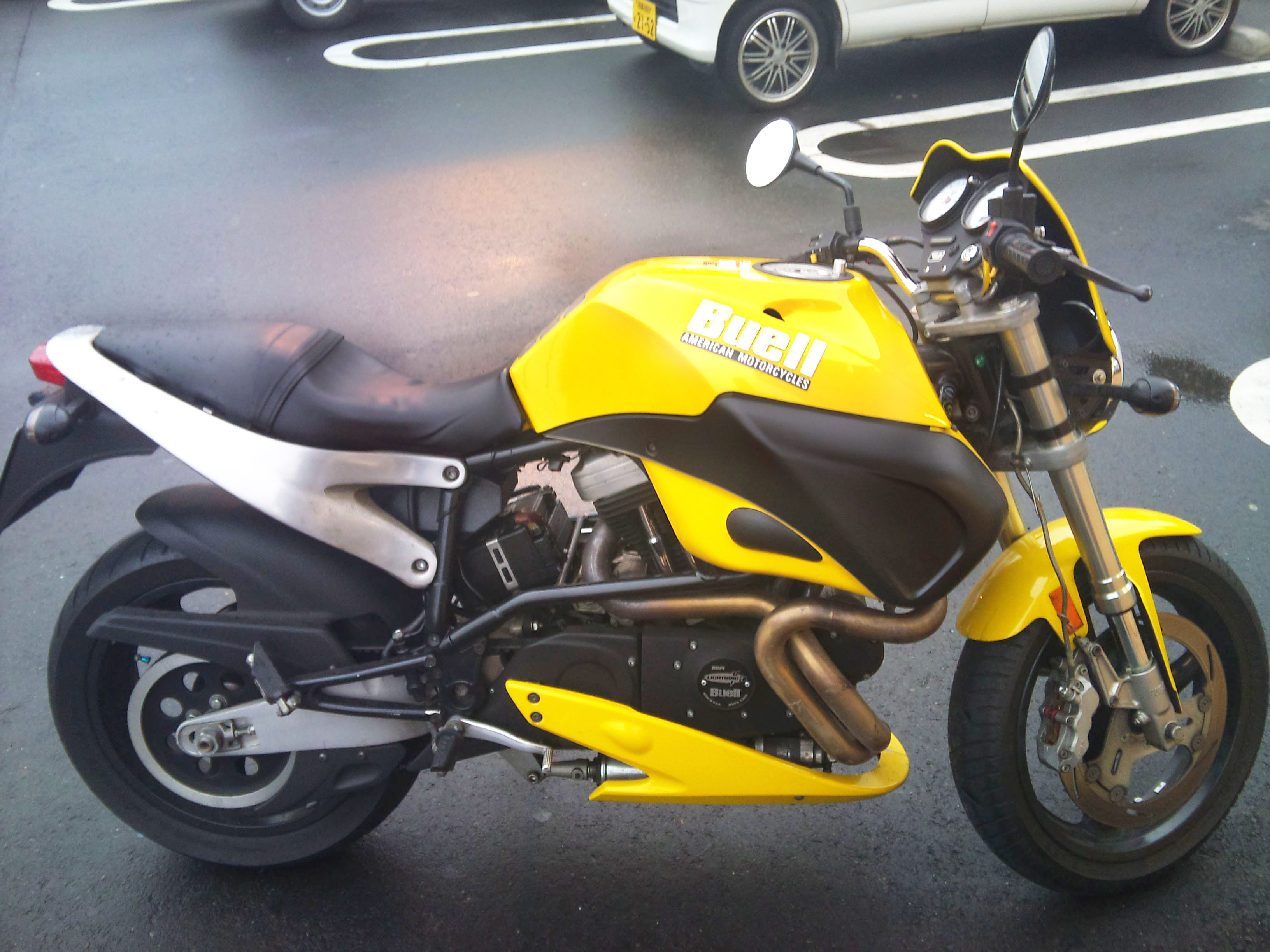 1999 BUELL X1 Lightning